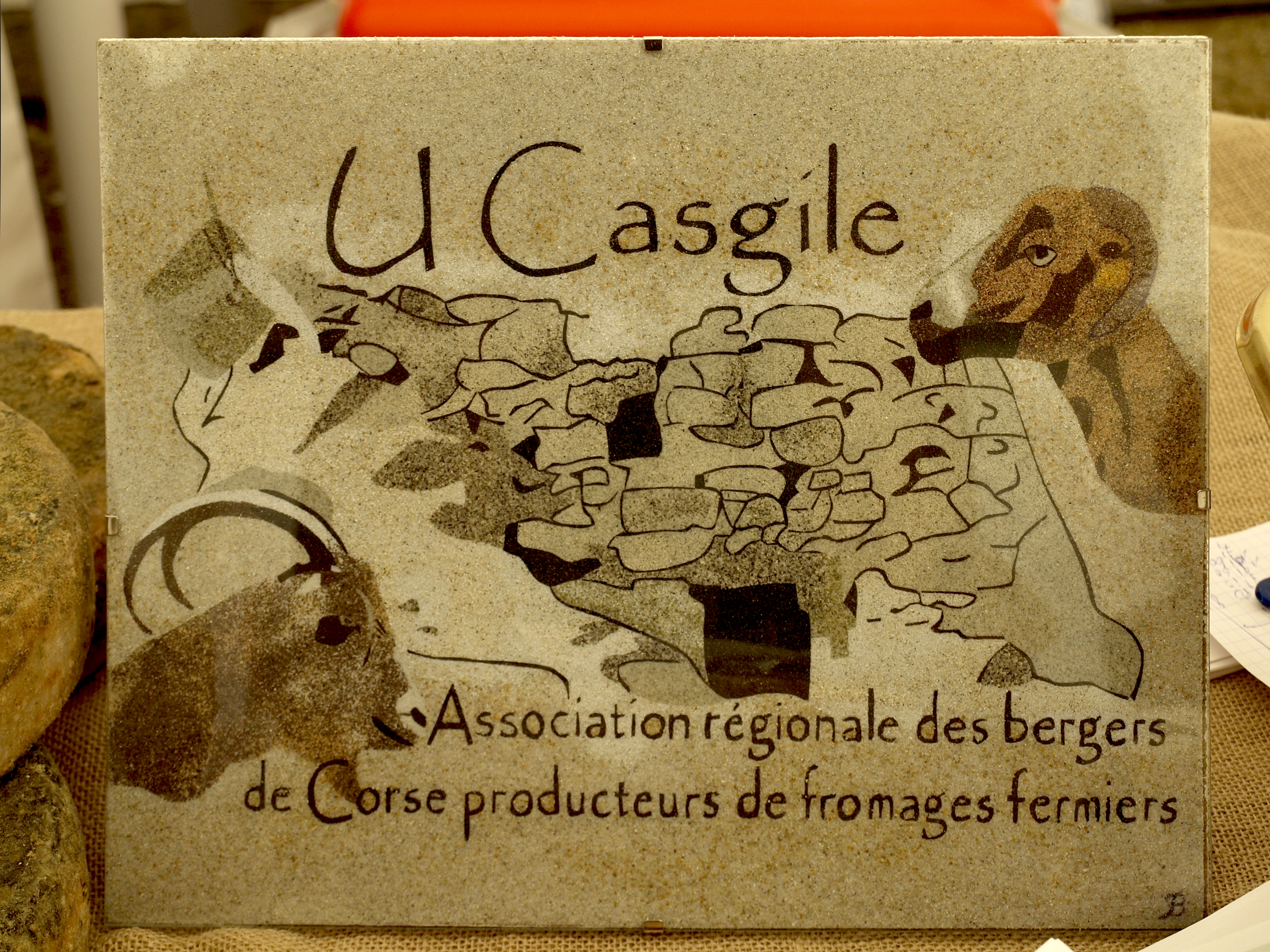 U Casile - Participation de l'association à la foire de Piedicroce (Corsica)